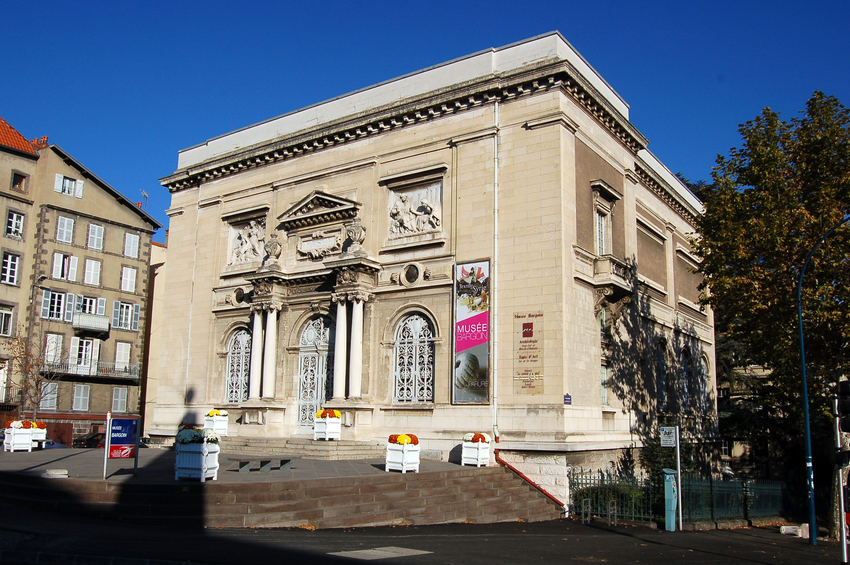 Musée Bargoin (Clermont-Ferrand, France)